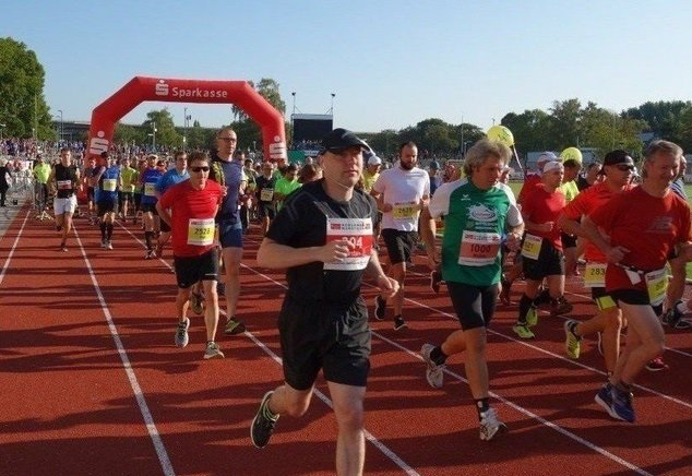 Start 2018 im Stadion Oberwerth